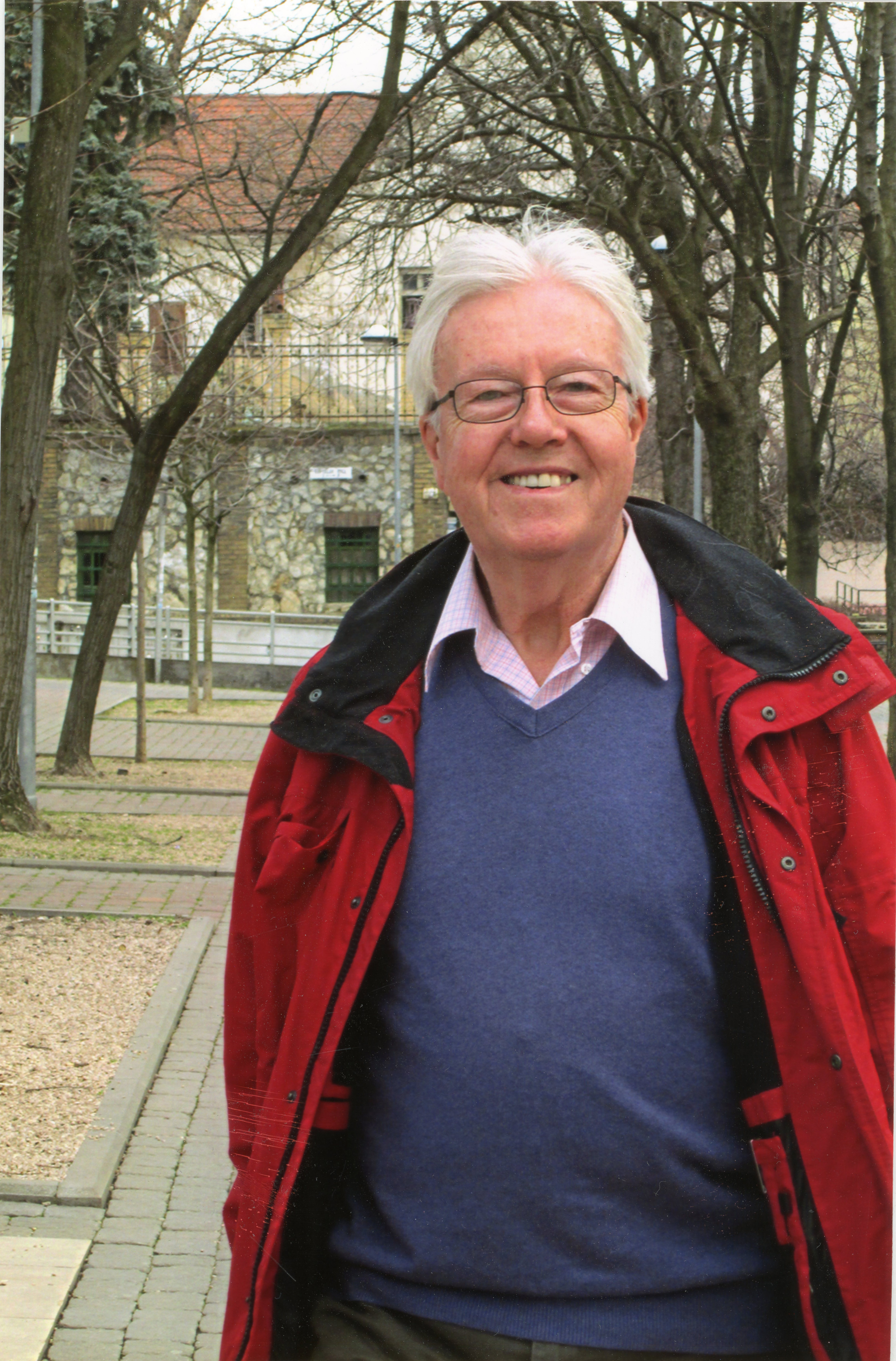 Alan Cameron, mars 2013, Budapest